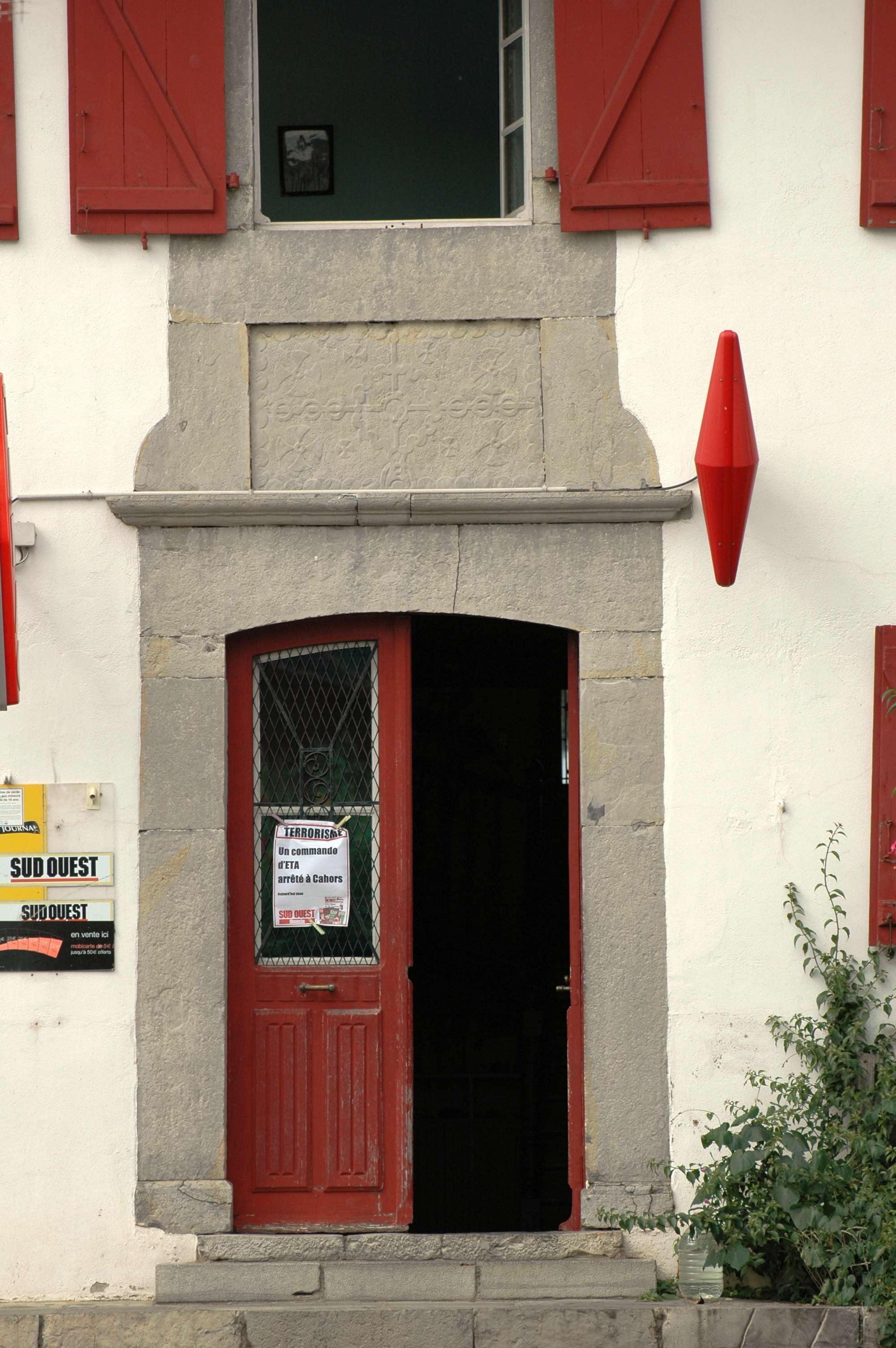 Hélette, Porte bouteille